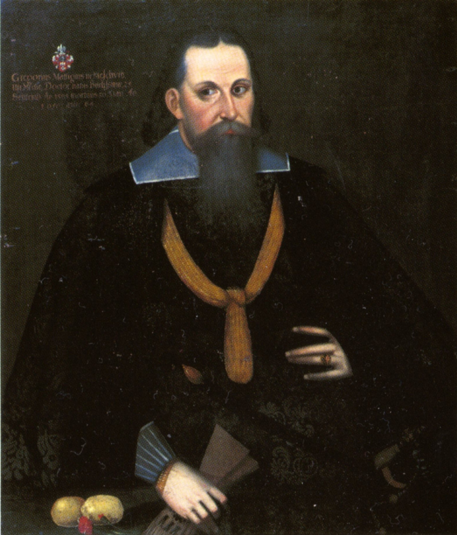 Gregor Mättig. Öl auf Leinwand, 105,5 x 89,5 cm, Museum Bautzen 3698. In: Zwischen Katheder, Thron und Kerker. Leben und Werk des Humanisten Caspar Peucer 1525-1602. Bautzen : Domowina-Verl. : 2002, S. 194